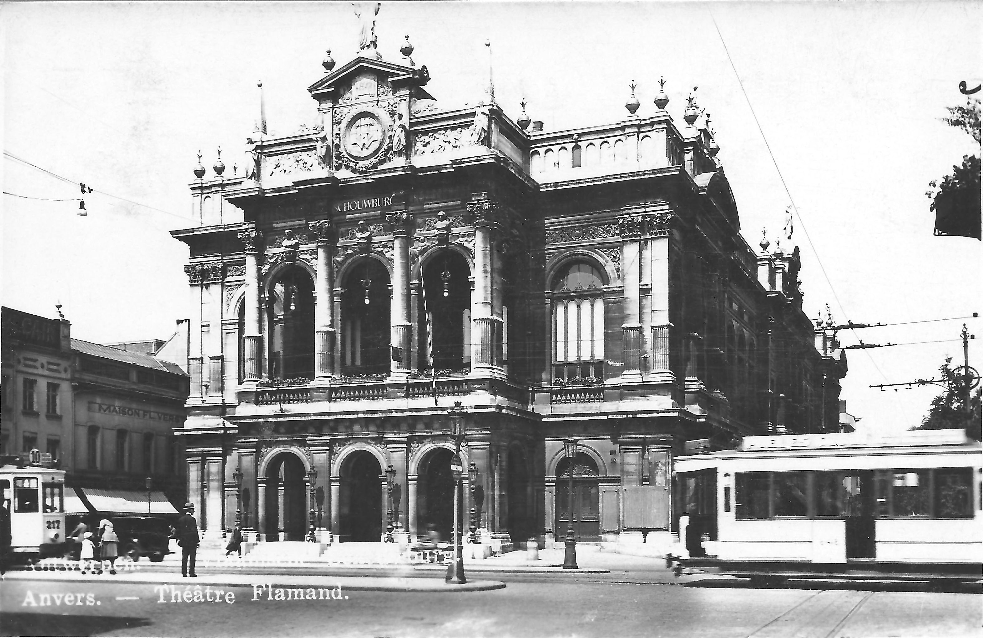 Vlaamse schouwburg op briefkaart gepost in januari 1937. Dit gebouw gelegen aan de Kipdorpbrug (noordkant) is in 1874 geopend, in 1958 gesloten en daarna gesloopt. Op deze plaats staat er nu de 'Theaterbuilding', een torengebouwcomplex met grote parkeerruimte. De theatergezelschappen 'Koninklijke Nederlandse Schouwburg' en 'HETPALEIS' hadden dit gebouw als hun thuisbasis.